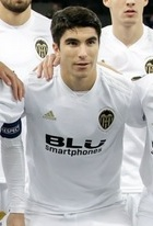 Alineació del València CF en el partit d'Europa League contra el Krasnodar, 2019.